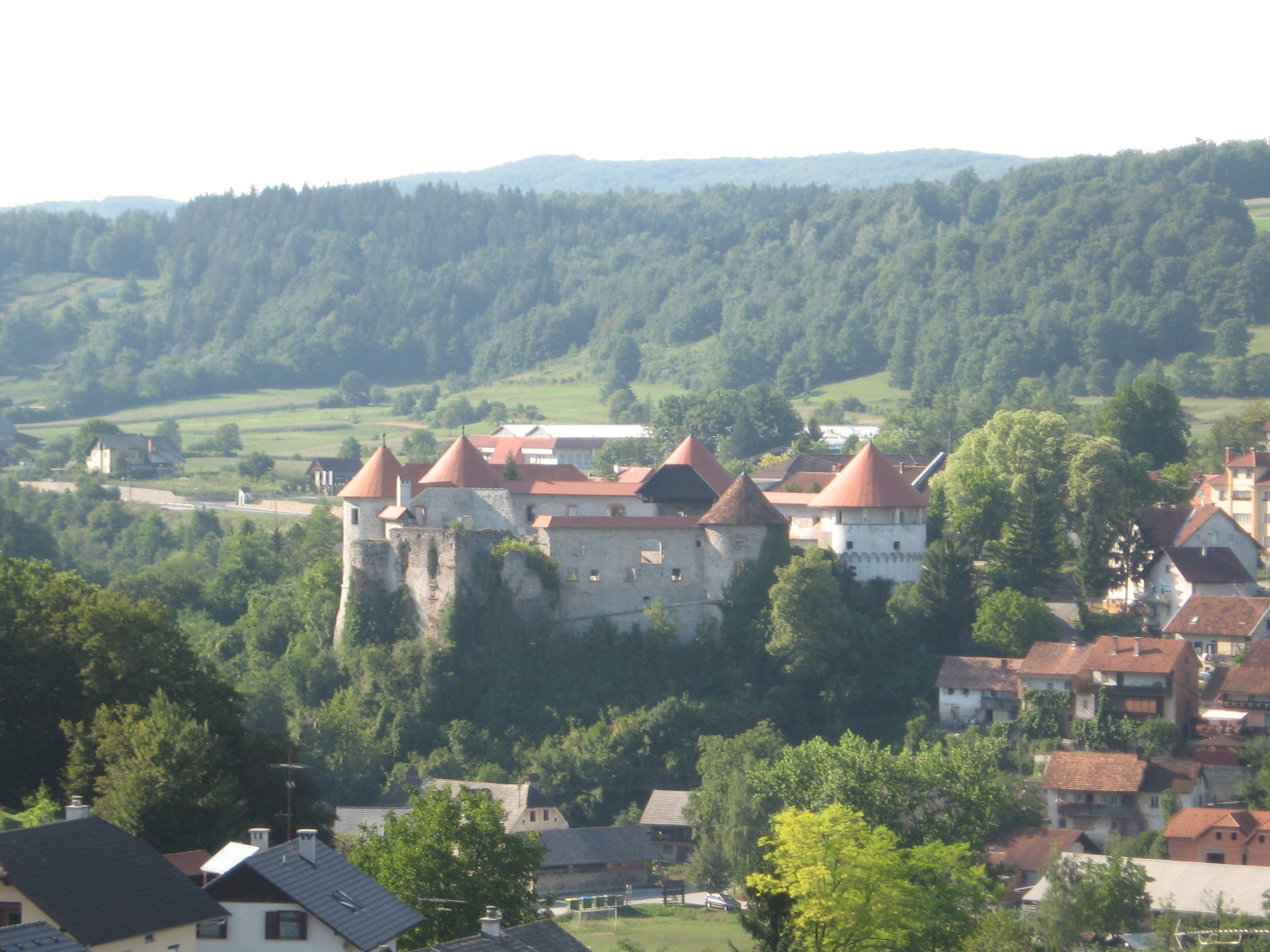 Grad Žužemberk, Slovenija